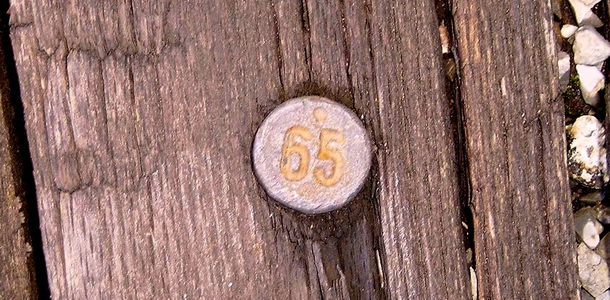 Schwellennagel welcher das Baujahr 19"65"zeigt